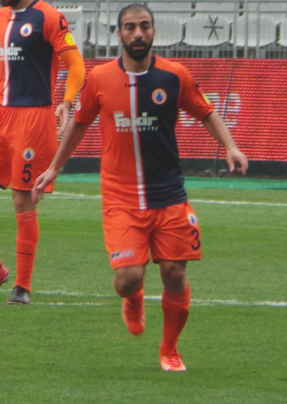 Sedat Ağçay İBB formasıyla Manisaspor maçında